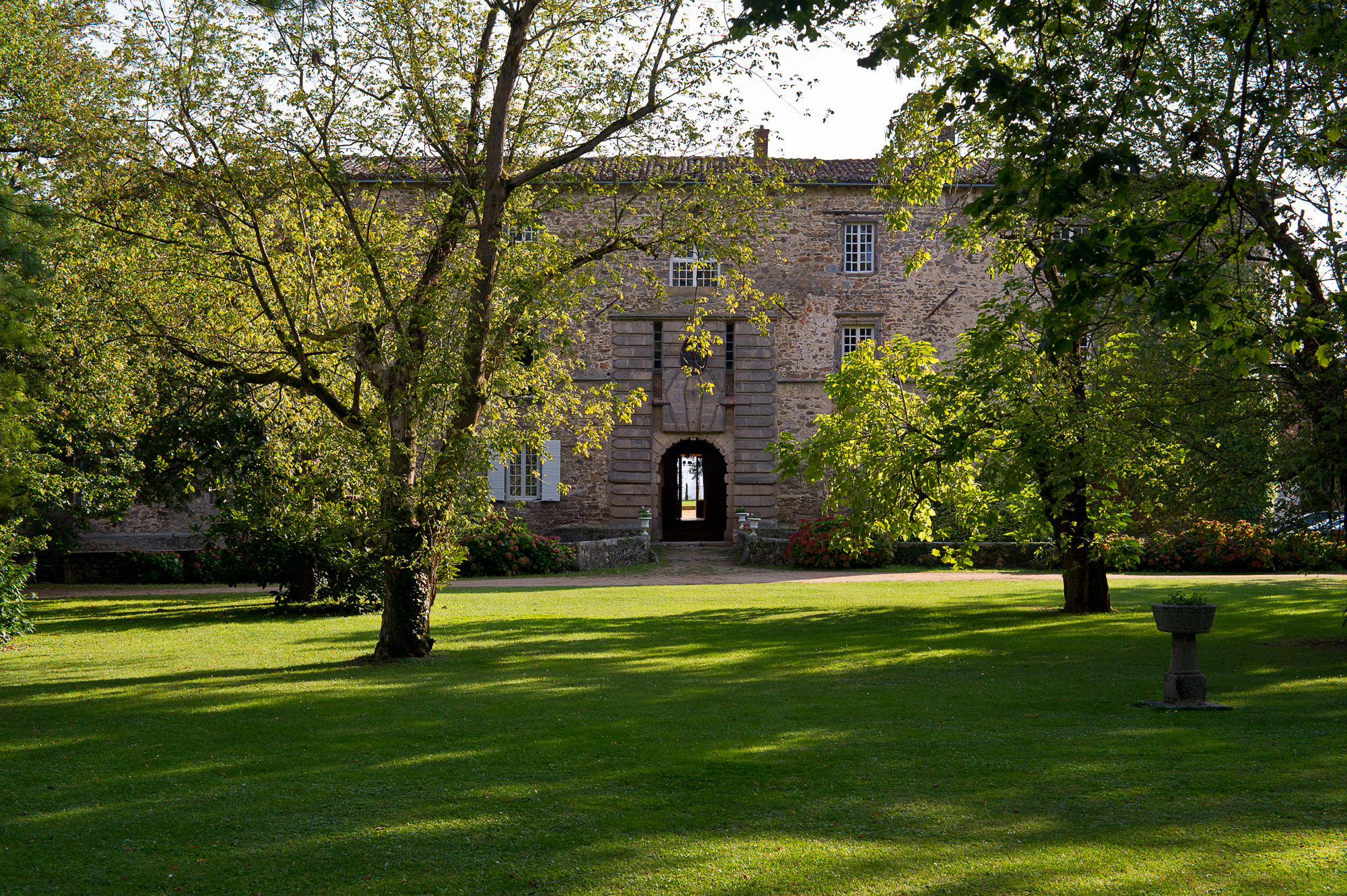 Château de Chassagny (Rhône, France) .